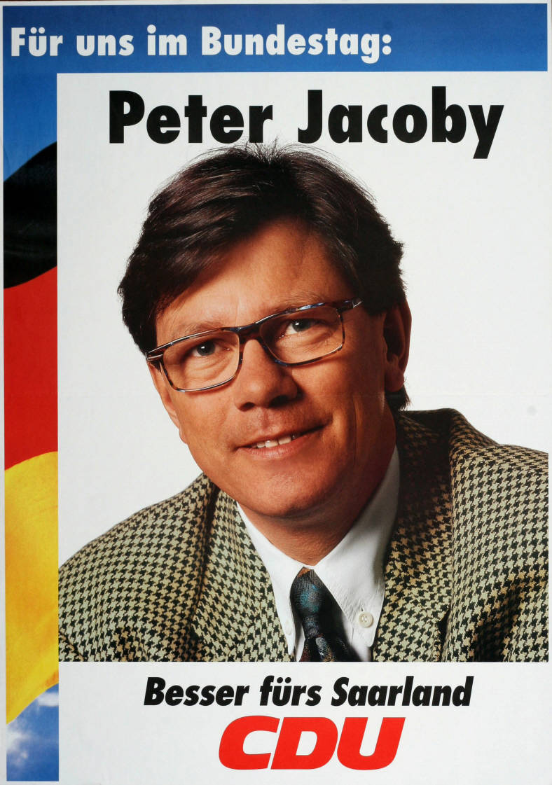 Für uns im Bundestag: Peter Jacoby Besser fürs Saarland CDU Abbildung: Porträtfoto - Nationalfarben Plakatart: Kandidaten-/Personenplakat mit Porträt Objekt-Signatur: 10-001: 4009 Bestand: Plakate zu Bundestagswahlen (10-001) GliederungBestand10-18: Plakate zu Bundestagswahlen (10-001) » Die 13. Bundestagswahl am 16. Oktober 1994 » CDU » Mit Porträtfoto Lizenz: KAS/ACDP 10-001: 4009 CC-BY-SA 3.0 DE